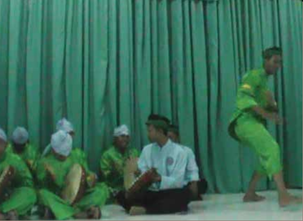 Seni Rudat Banten merupakan seni pertunjukkan yang berasal dari Banten